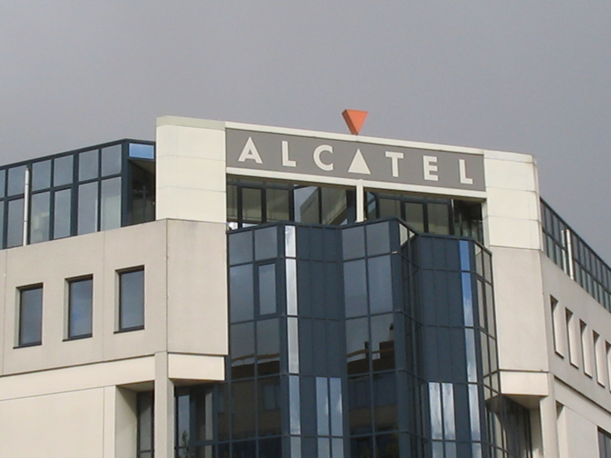 Alcatel office, Rijswijk-Plaspoelpolder, 2 oktober 2005